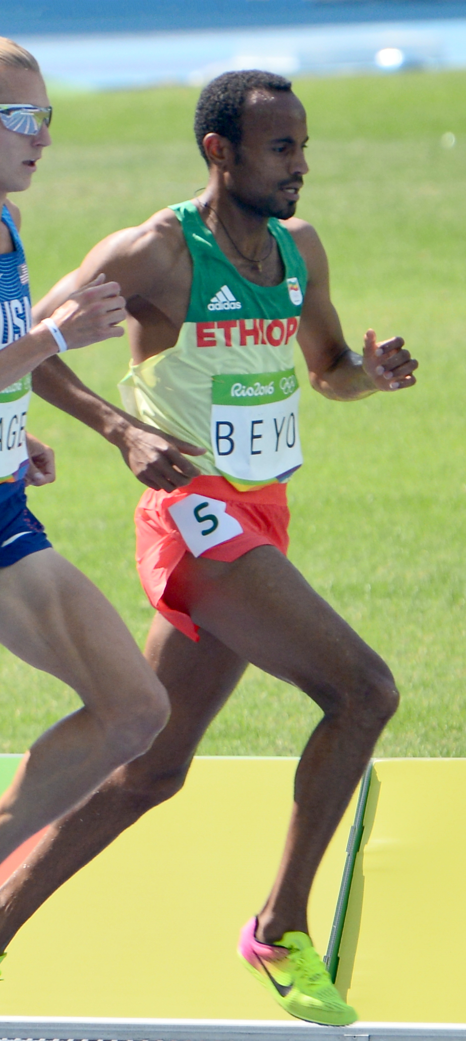 Série du 3000m steeple Homme des JO de Rio, 2016